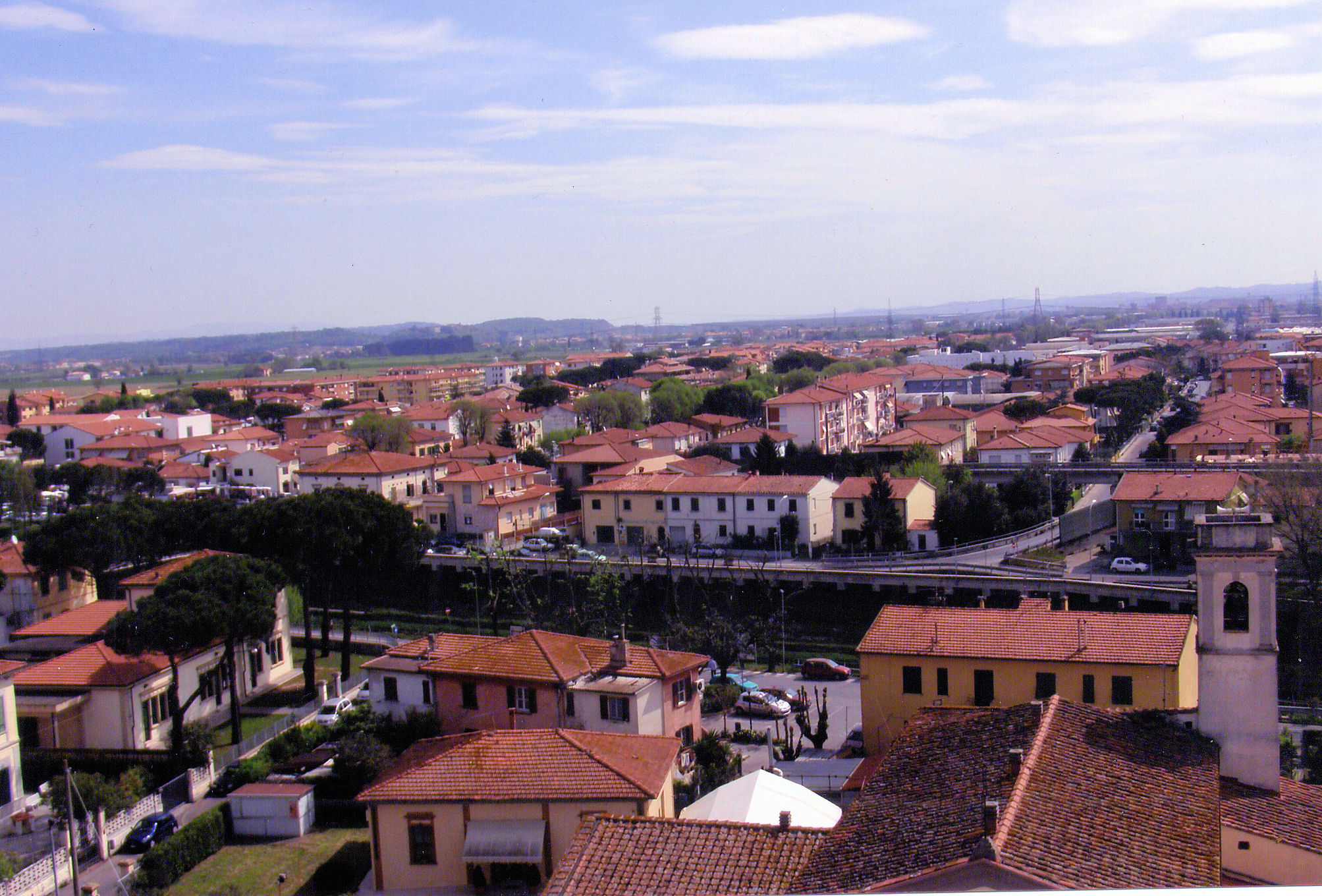 Fornacette panorama